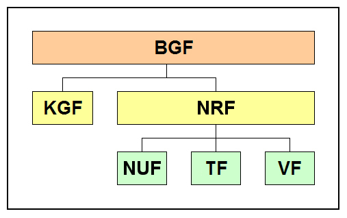 Überarbeitung und Aktualisierung der Quelle durch Änderungen in der DIN 277-1 Untergliederung der Brutto-Grundfläche nach der DIN 277-1:2016-01 BGF (Brutto-Grundfläche) - Gross floor area KGF (Konstruktions-Grundfläche) - construction floor area NRF (Netto-Raumfläche) - net usable floor area NUF (Nutzungsfläche) - useable floor space TF (Technikfläche) - space needed for plant and utilities VF (Verkehrsfläche)